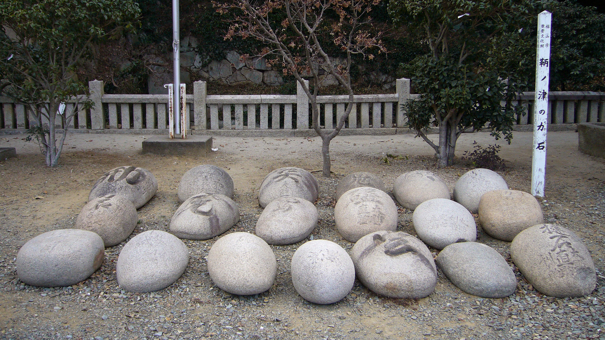 Nunakuma-jinja, Fukuyama, Hiroshima, Japan